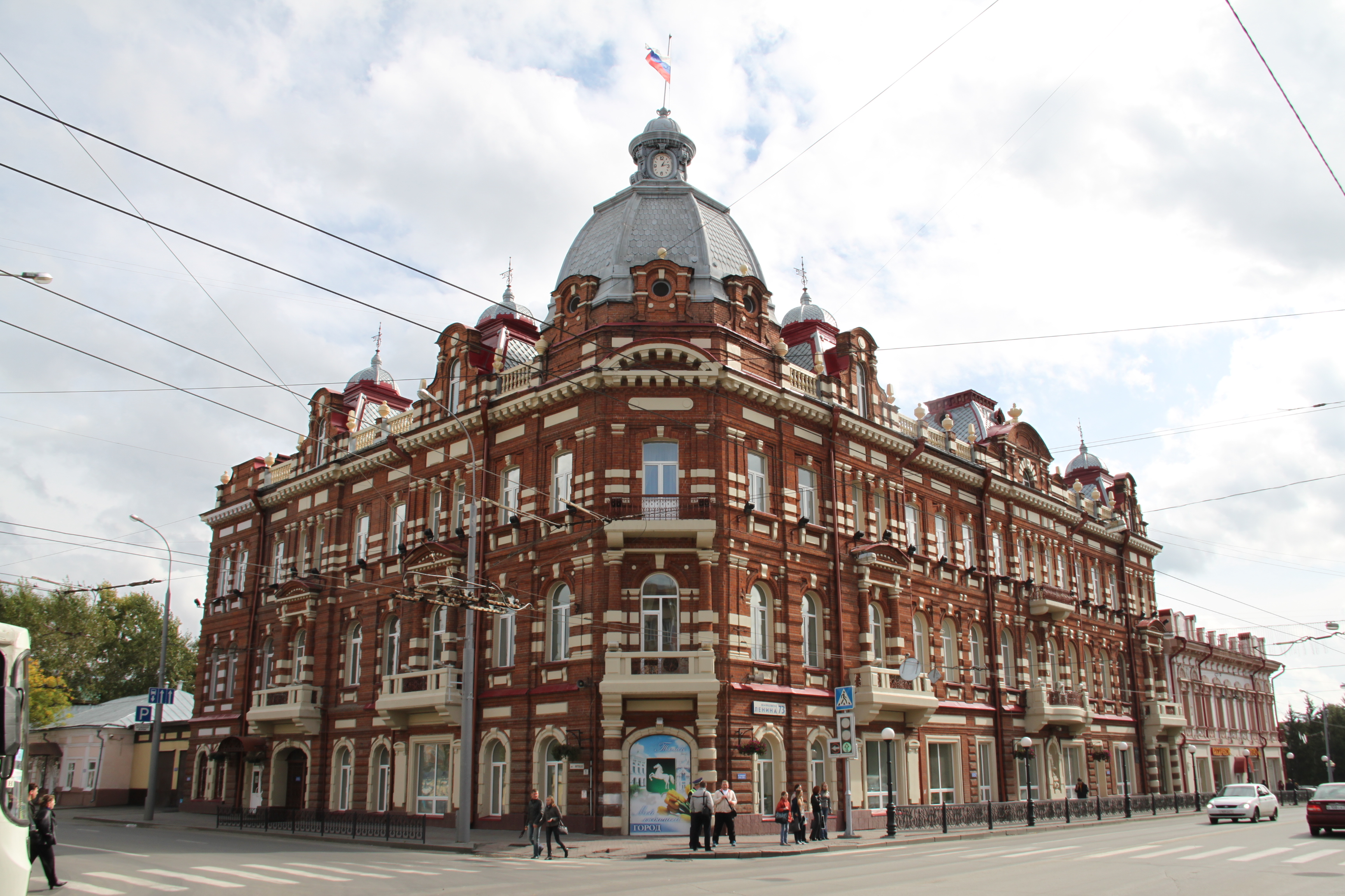 Мэрия Томска